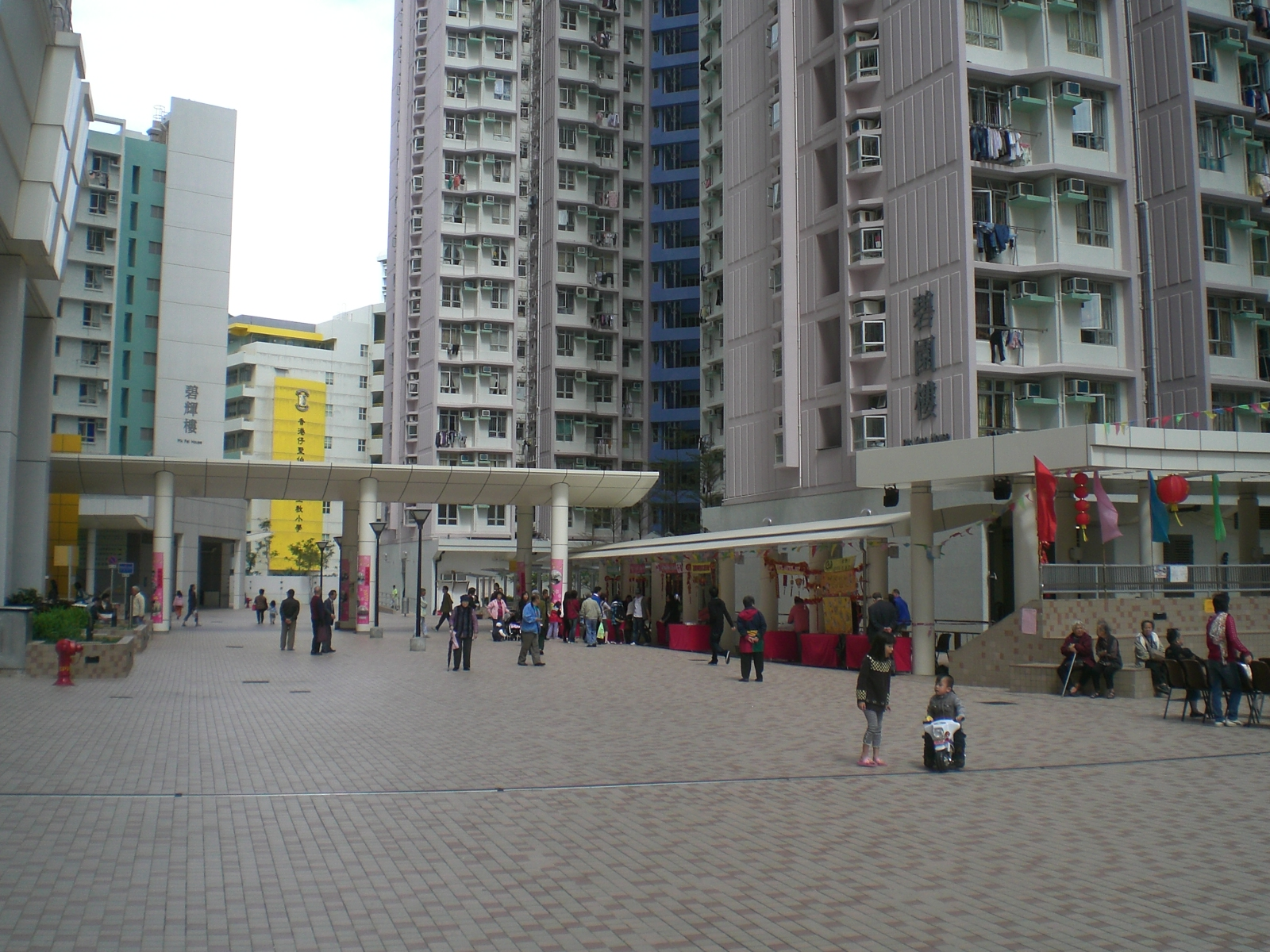 香港仔 石排灣邨